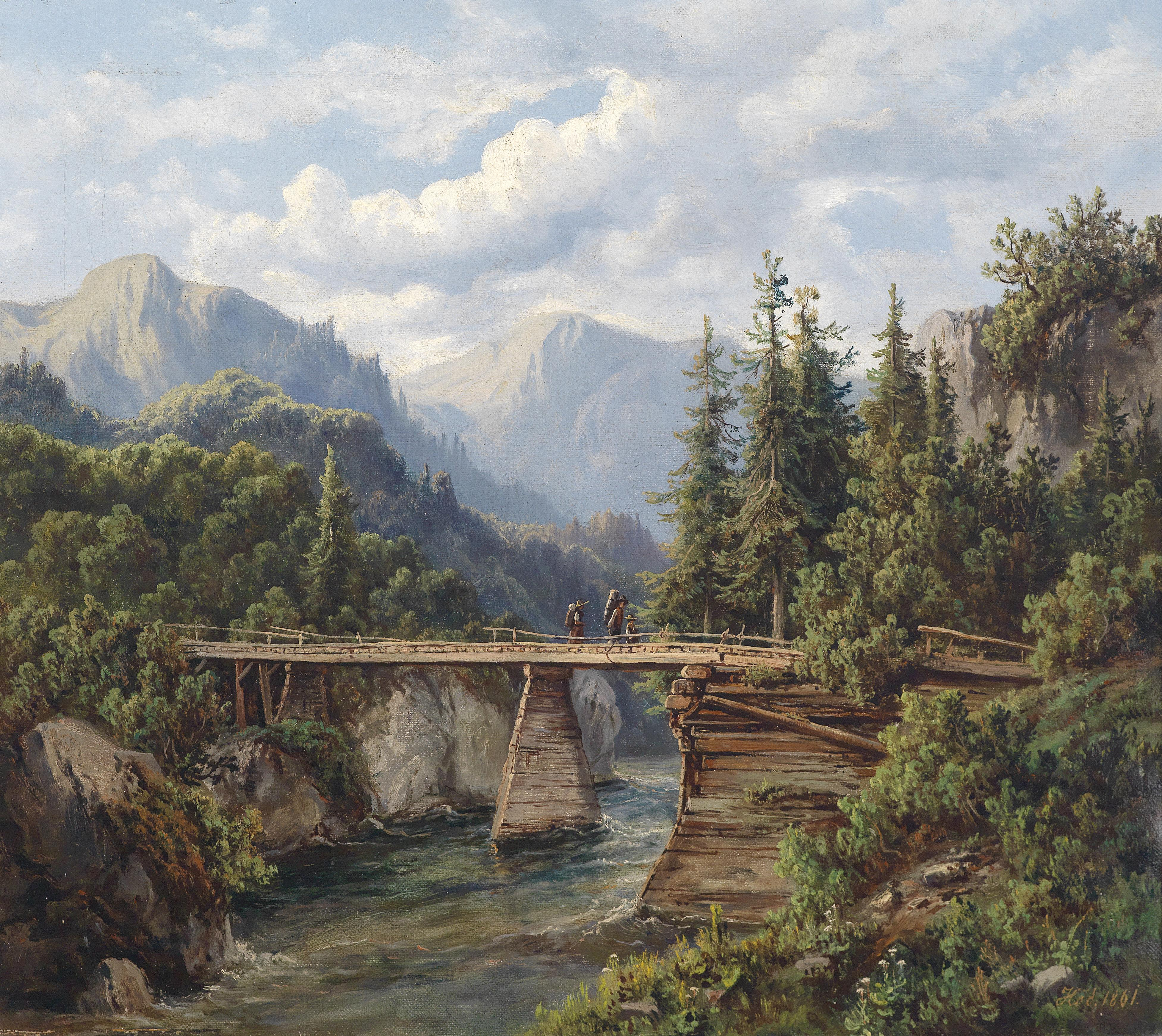 Holzbrücke über einem Gebirgsbach mit figuraler Staffage